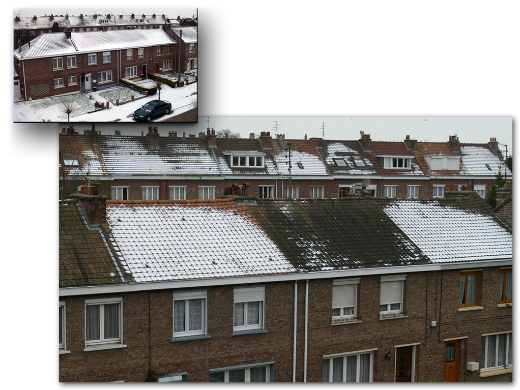 En climat tempéré, la première source de déperdition thermique des maisons est la toiture (jusqu’à 30%, voire plus). La thermographie infrarouge, ou avec moins de précisions l'observation de la neige sur les toitures montrent les différences d'isolation entre maisons. Ces différences traduisent aussi des différences de consommations d'énergie et donc d'émissions directes ou indirectes de gaz à effet de serre ou de contribution en matière de risques et de déchets liés au nucléaire (si le chauffage est électrique et l'électricité d'origine nucléaire).